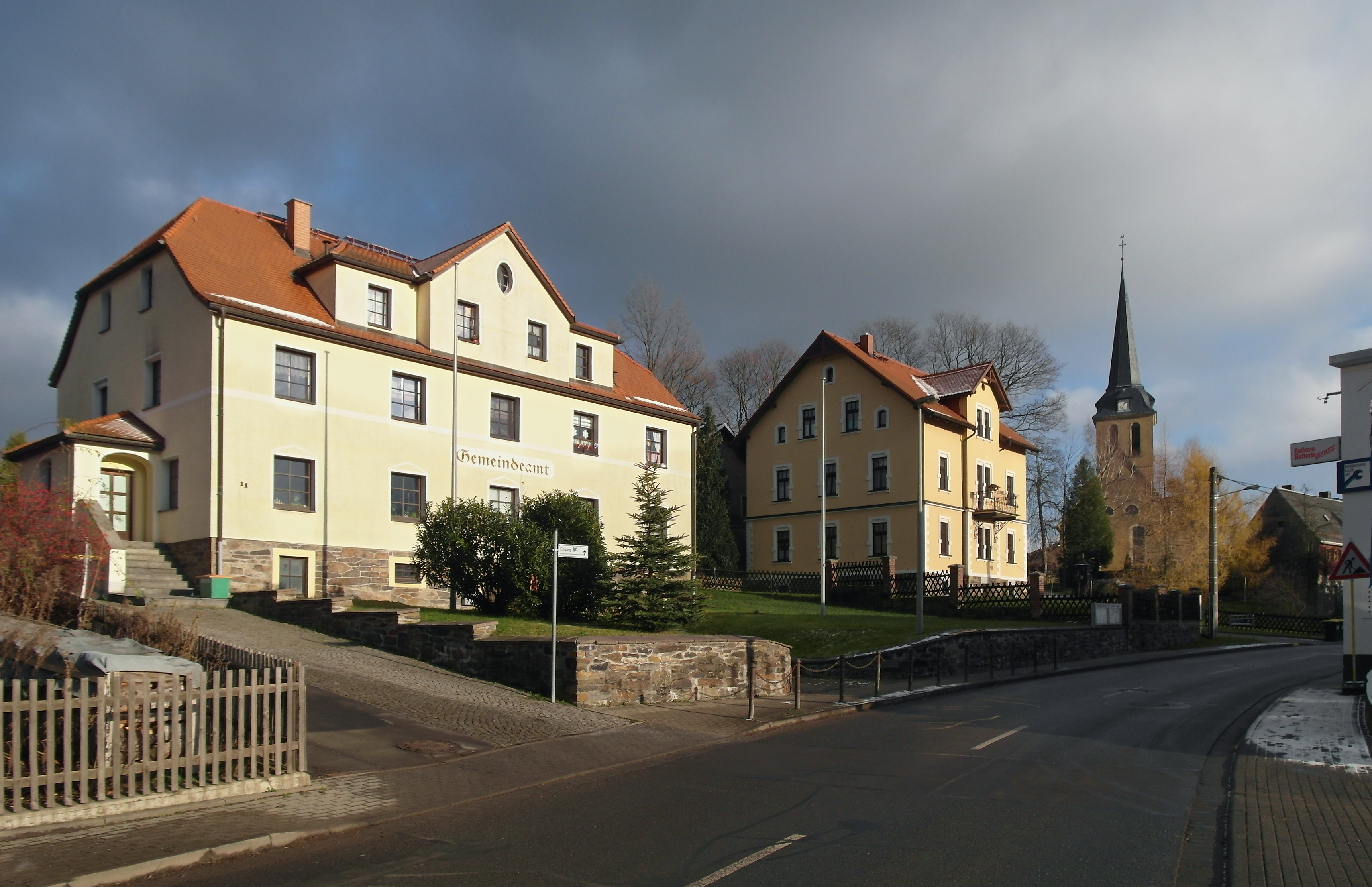 01.12.2017 09627 Hilbersdorf (Bobritzsch-Hilbersdorf): Gemeindeamt Hilbersdorf, Alte Hauptstraße 11 (GMP: 50.911274,13.391048), Wohnhaus Alte Hauptstraße 13, Dorfkirche (GMP: 50.910975,13.392068). [SAM3034.JPG]20171201350DR.JPG(c)Blobelt